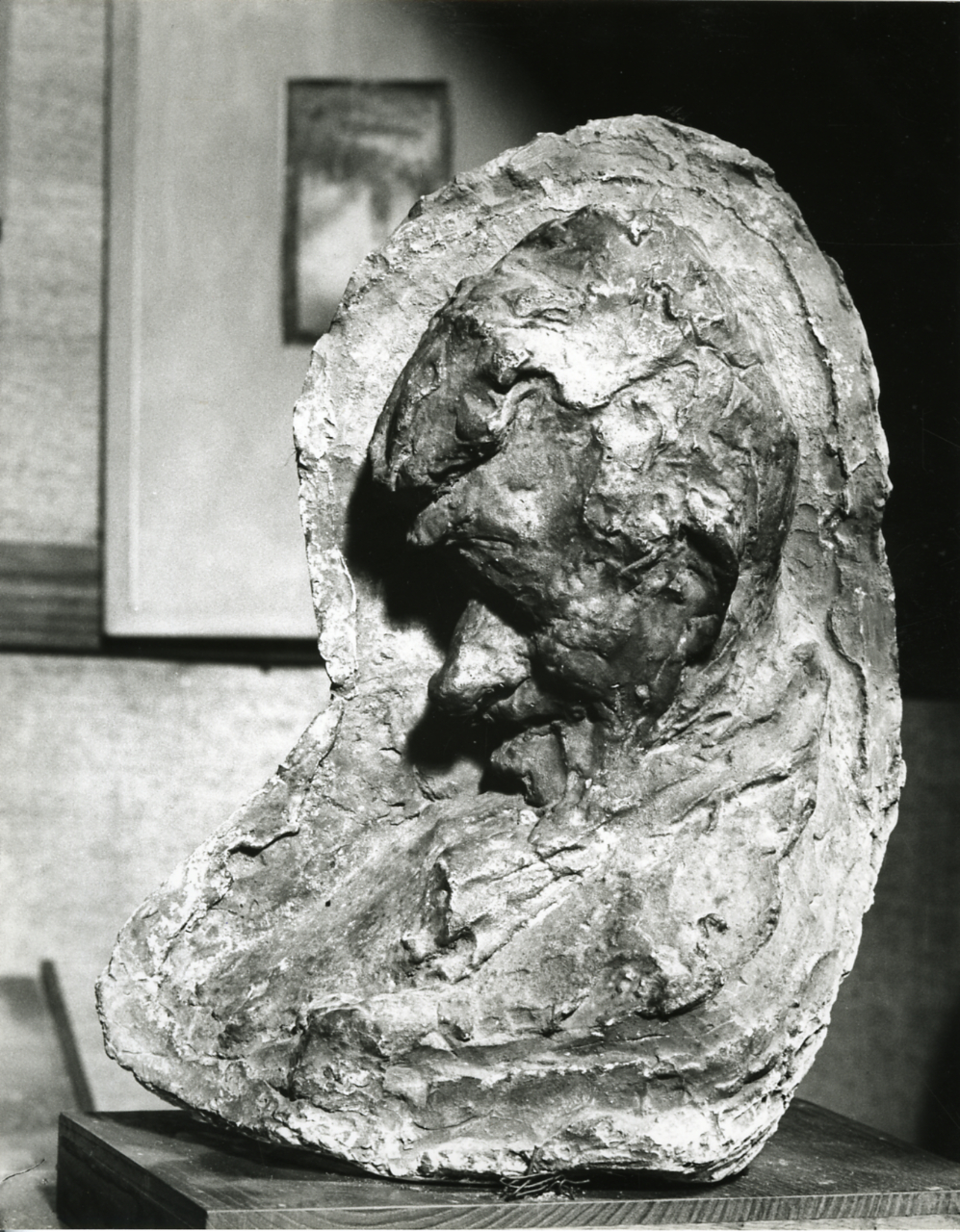 Servizio fotografico : Barzio, 1978 / Paolo Monti. - Stampe: 2 : Positivo b/n, gelatina bromuro d'argento/ carta, 24x30. - ((Al verso delle stampe manoscritto numero di negativo corrispondente: 2997/31, 3136/14. Sul coperchio della scatola manoscritto a pennarello nero: "Medardo Rosso". - Occasione: Documentazione per la pubblicazione del catalogo: "Medardo Rosso, 1858-19" , Ed. Der Kunstverein, 1984. - Fonte: Agenda di Paolo Monti: Nikon Leika 3001-/ Monti 1978 (1978-1982), presso Archivio Paolo Monti